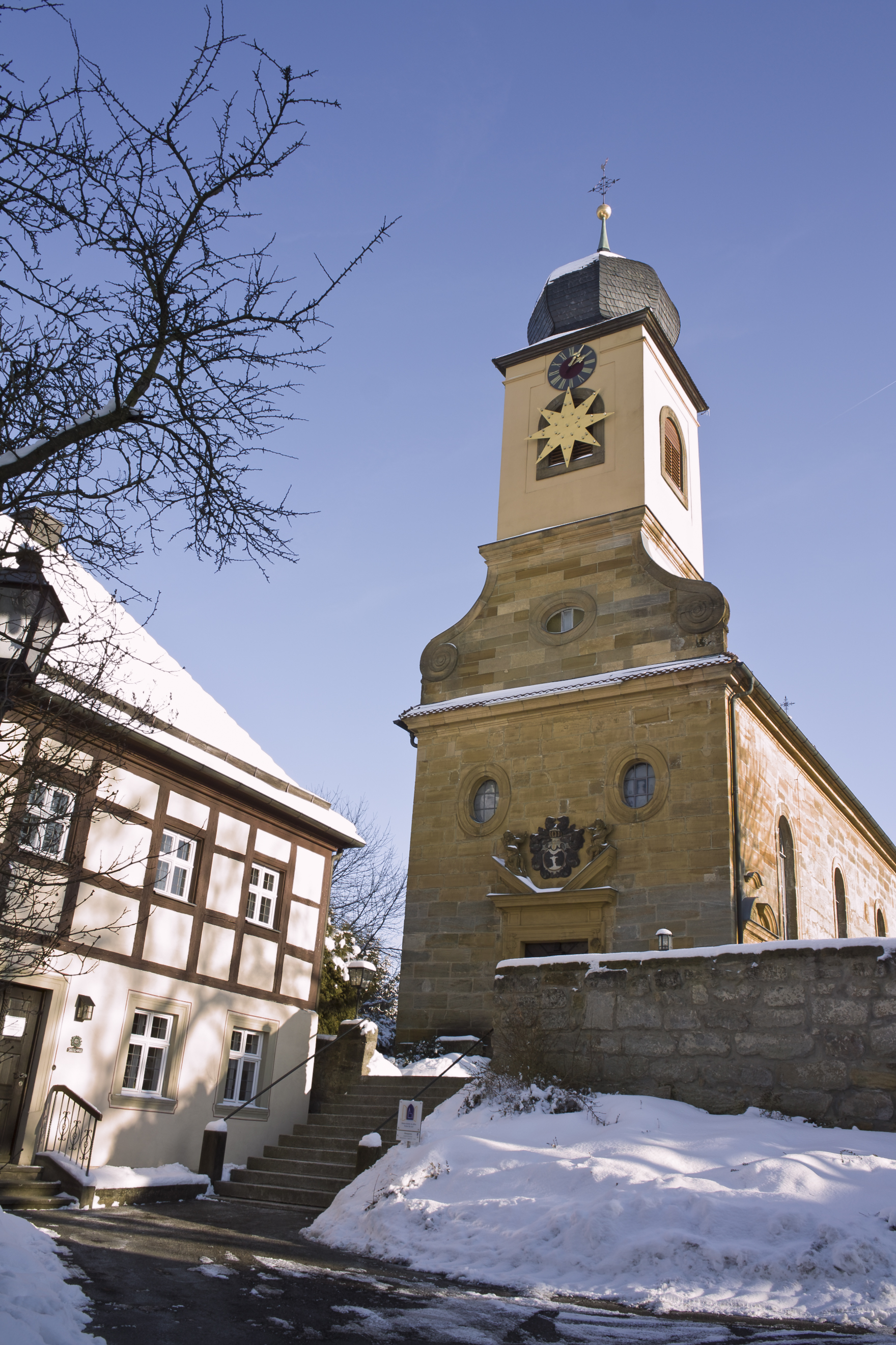 Lukaskirche in Kunreuth, Dezember 2010